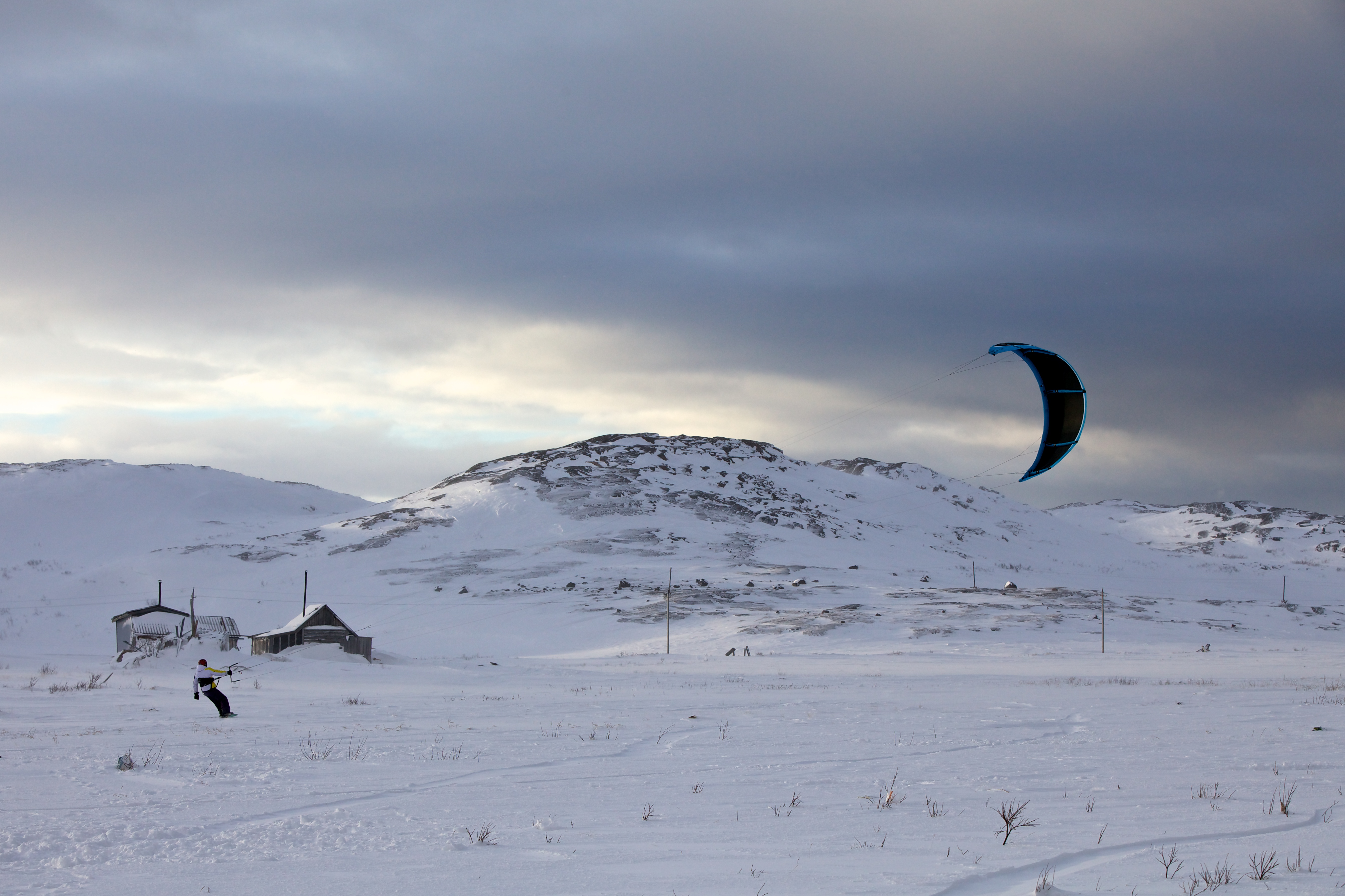 Kitesurfing in Teriberka